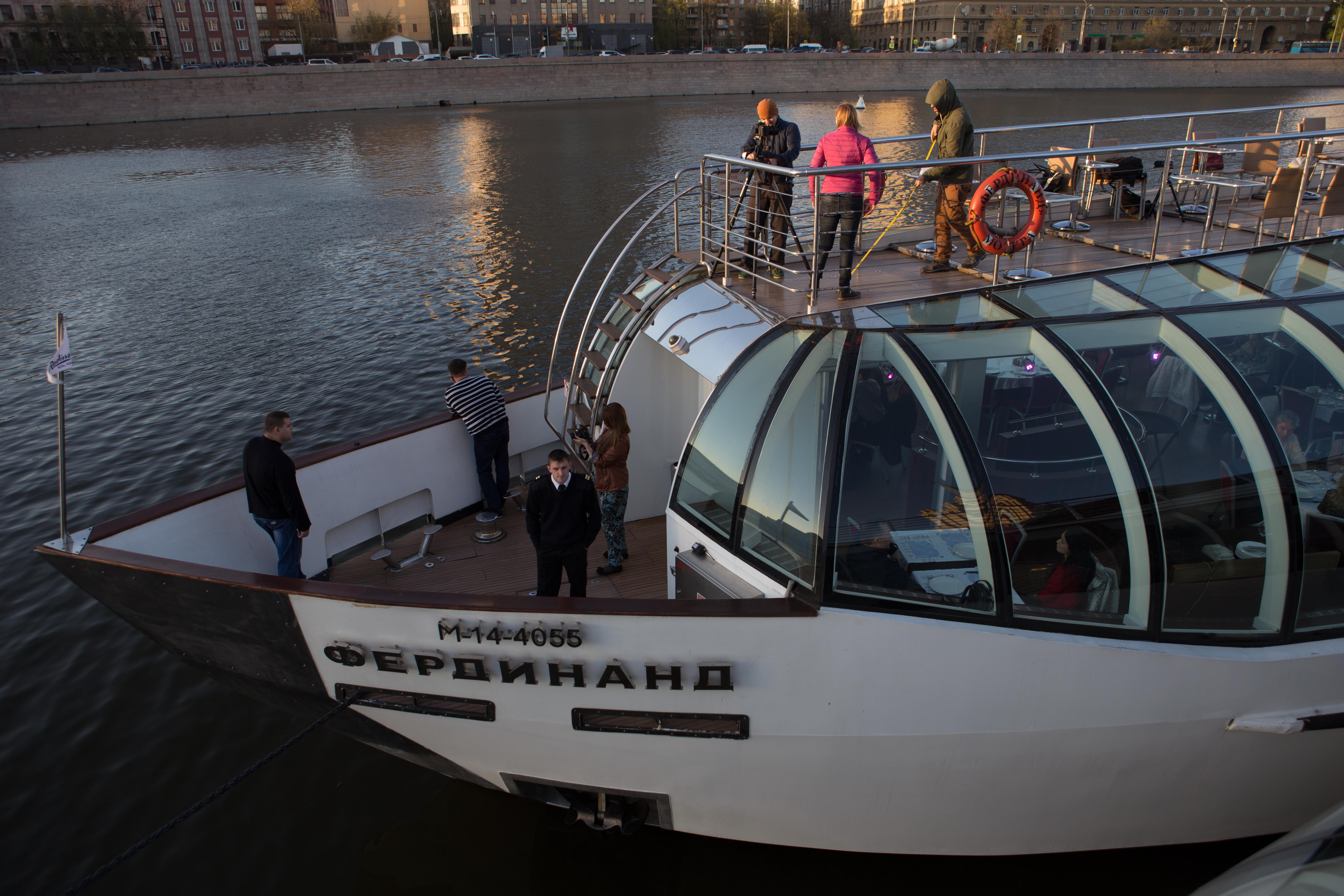 Один из кораблей флотилии "Рэдиссон", построенный на Рижской судоверфи.